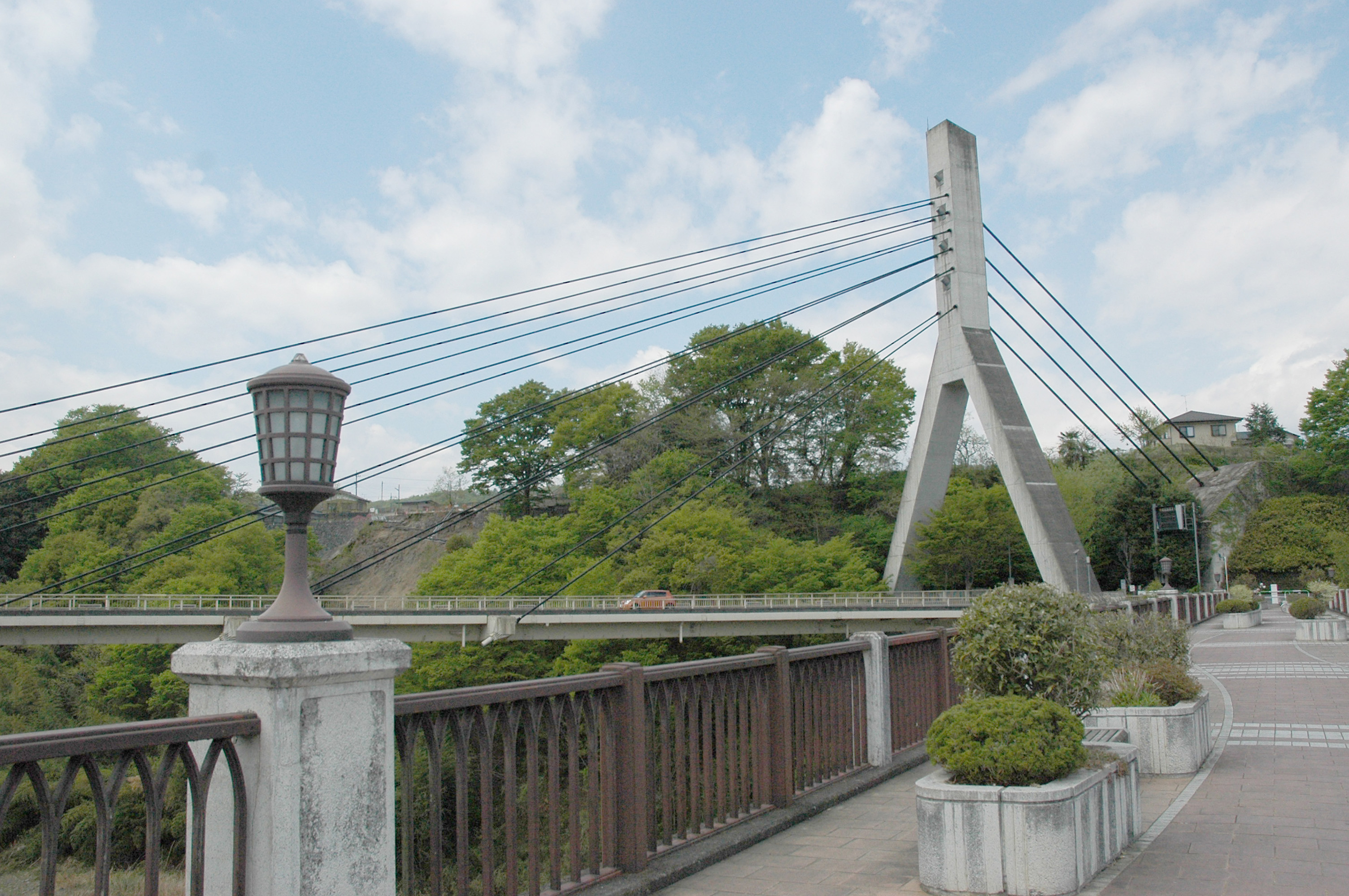 『あの花』のキービジュアルのひとつ。旧秩父橋から見た新秩父橋。